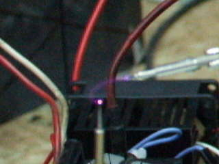 Стриммерный канал